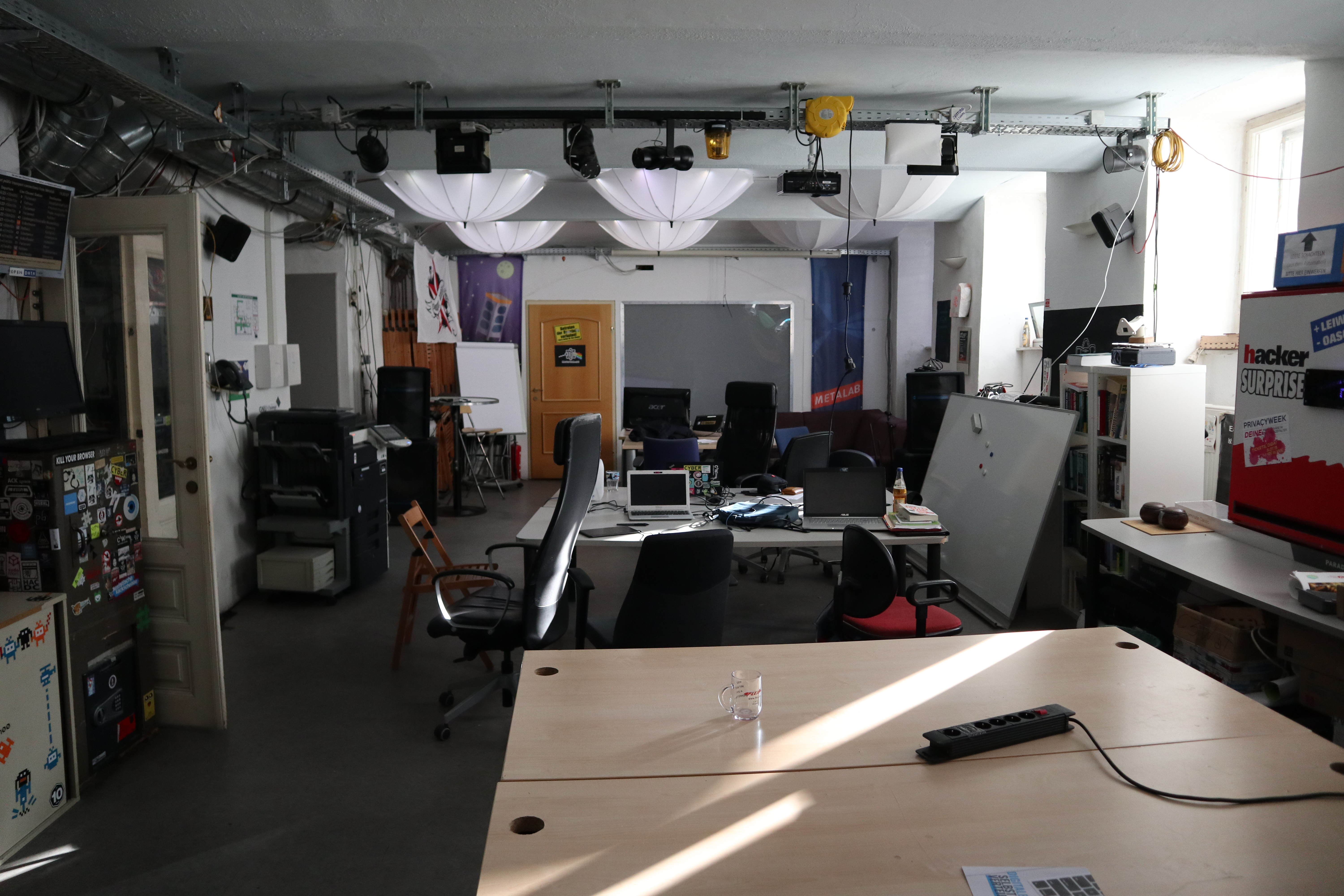 Das ist der Hauptraum im Metalab